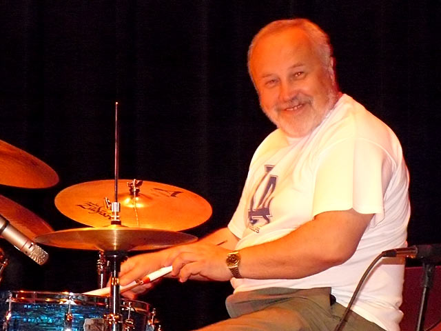 Kazimierz Jonkisz, Puławy 2007